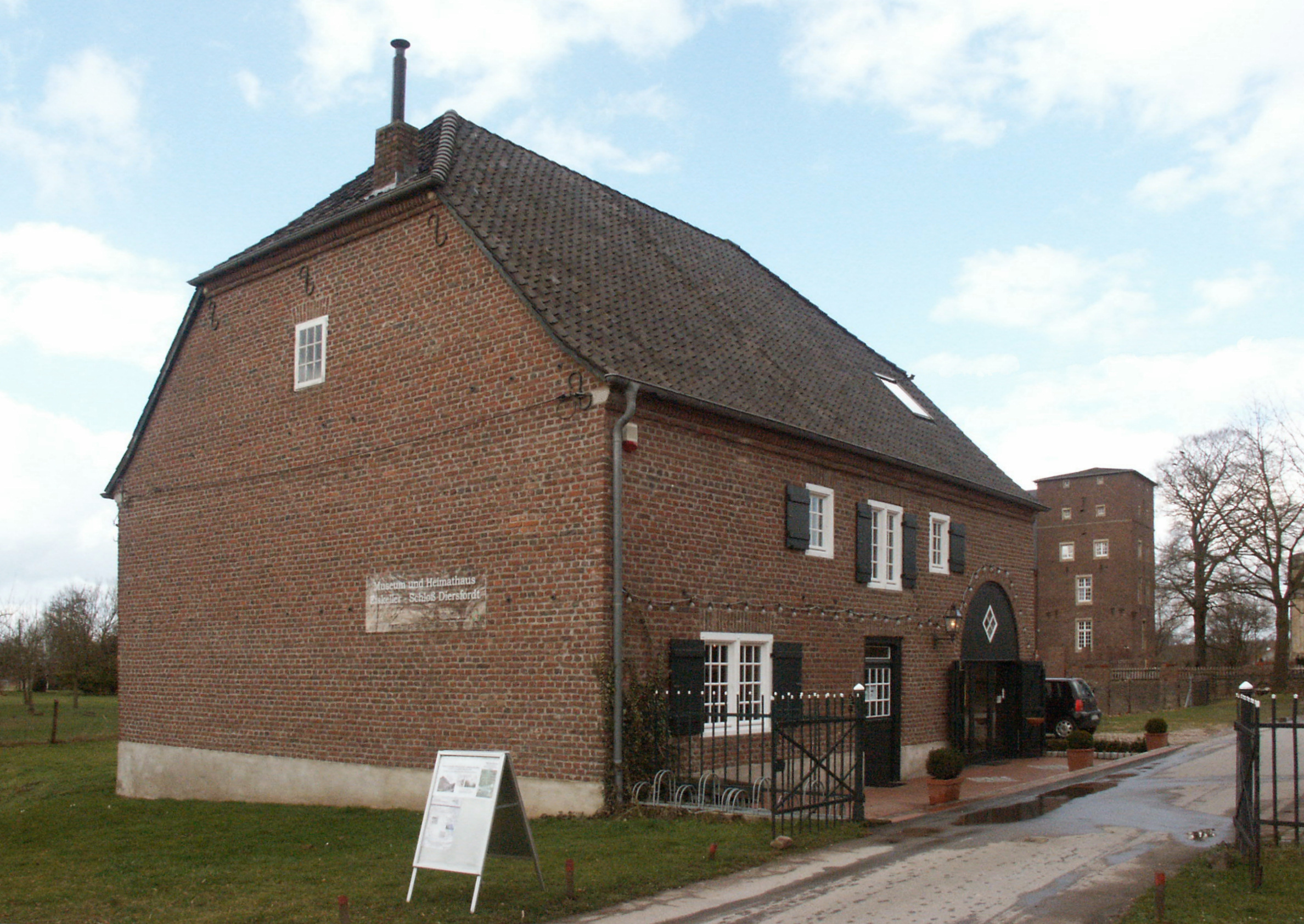 Der sogenannte Eiskeller des Schlosses Diersfordt